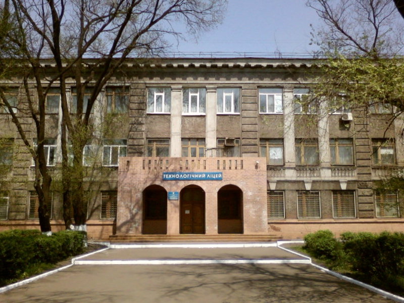 Маріупольський технологічний ліцей. Проспект Ілліча